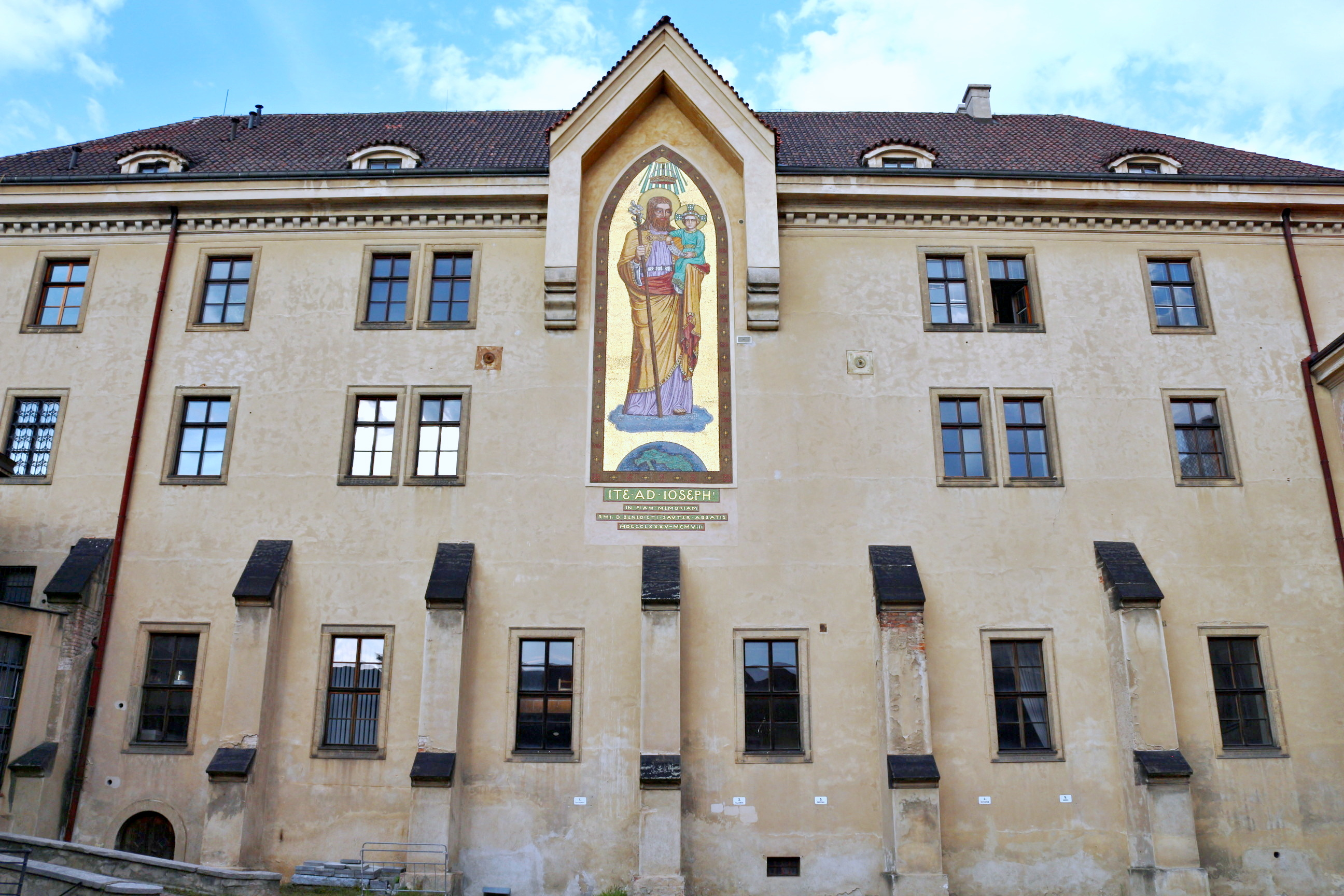 Klášter Na Slovanech - opatství